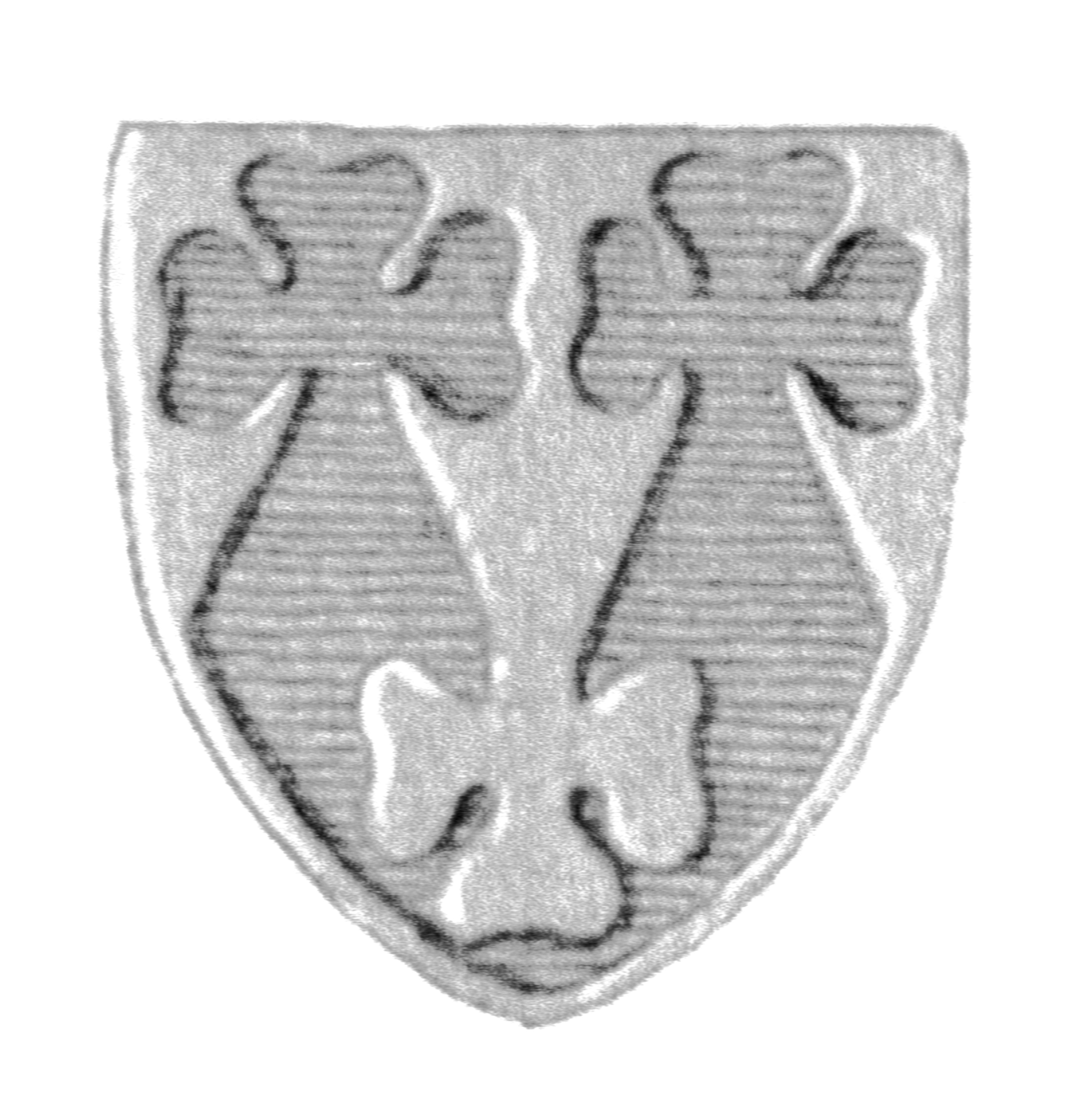 Siegel des Ratsmannes Johann van Schepenstede. Das Siegel stammt aus der Zeit um 1337. Siehe Emil Ferdinand Fehling: Lübeckische Ratslinie, Nr. 322 (Johann van Schepenstede).